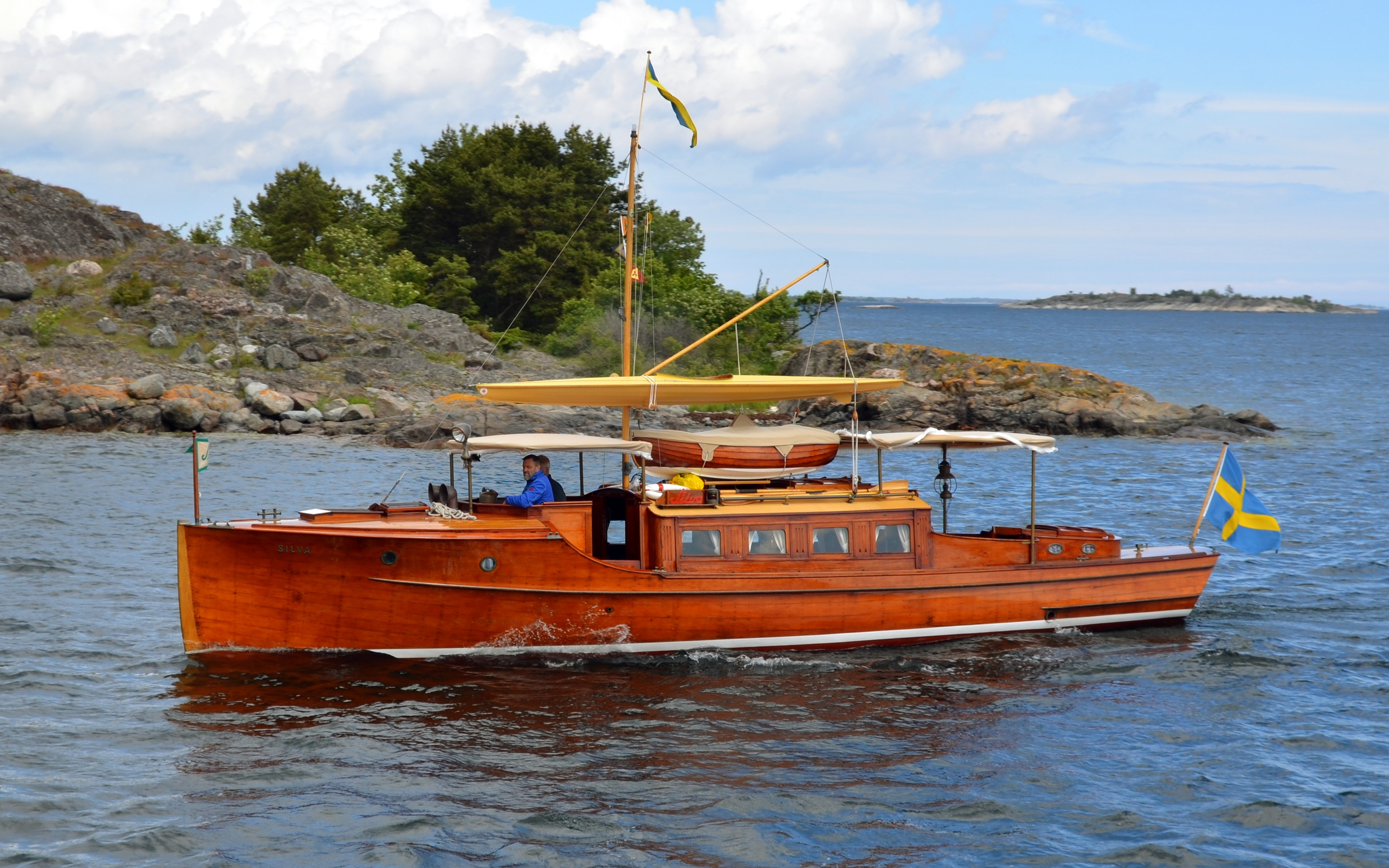 Den k-märkta motorbåten Silva